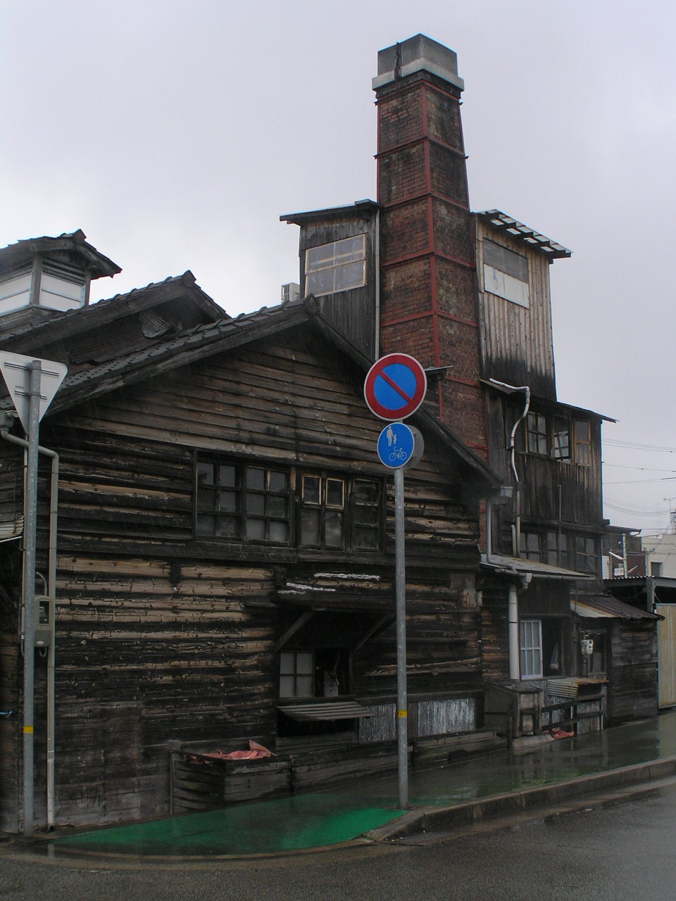 ～photo by Autumn Snake 【おぉたむ すねィく探検隊】